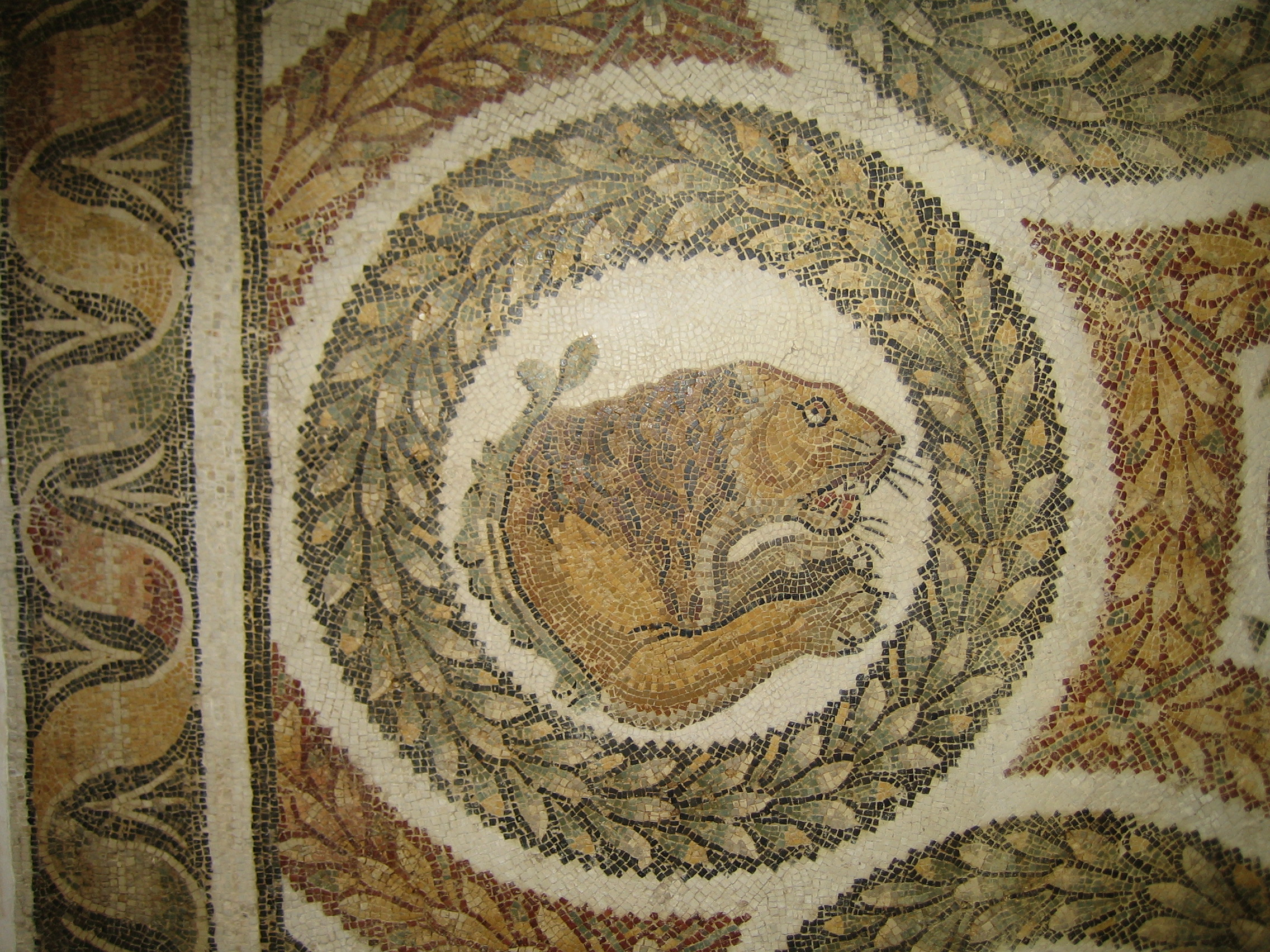 Mosaico pavimentale romano con figura di leone fra ghirlande. Museo nazionale del Bardo, a Tunisi.